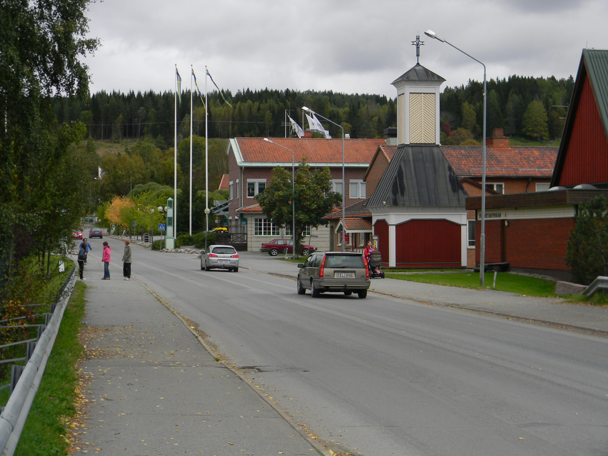 Gatubild från Svenstavik, bergs Kommun